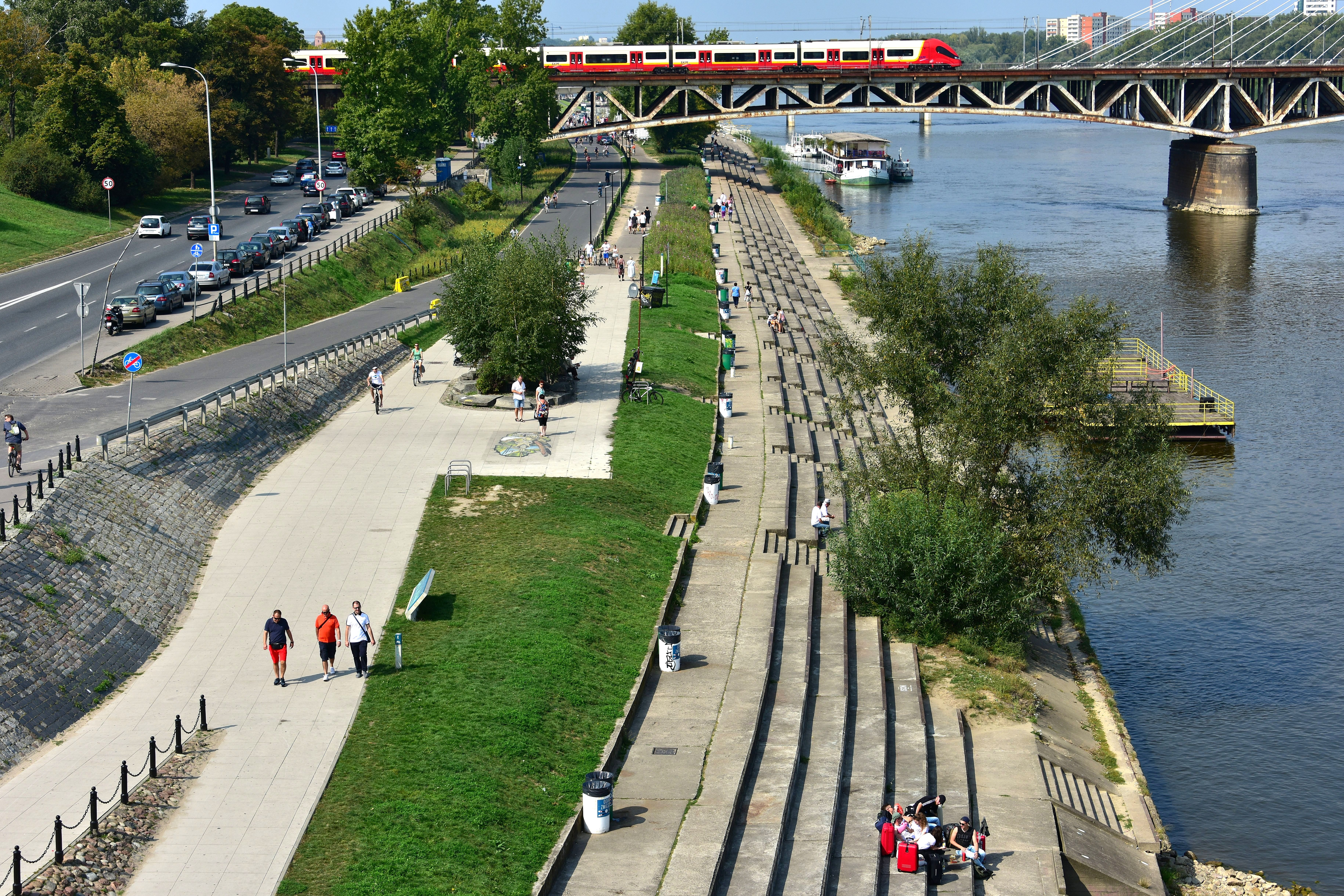 Bulwar Bohdana Grzymały-Siedleckiego w Warszawie, widok z mostu Poniatowskiego w kierunku mostu średniocowego